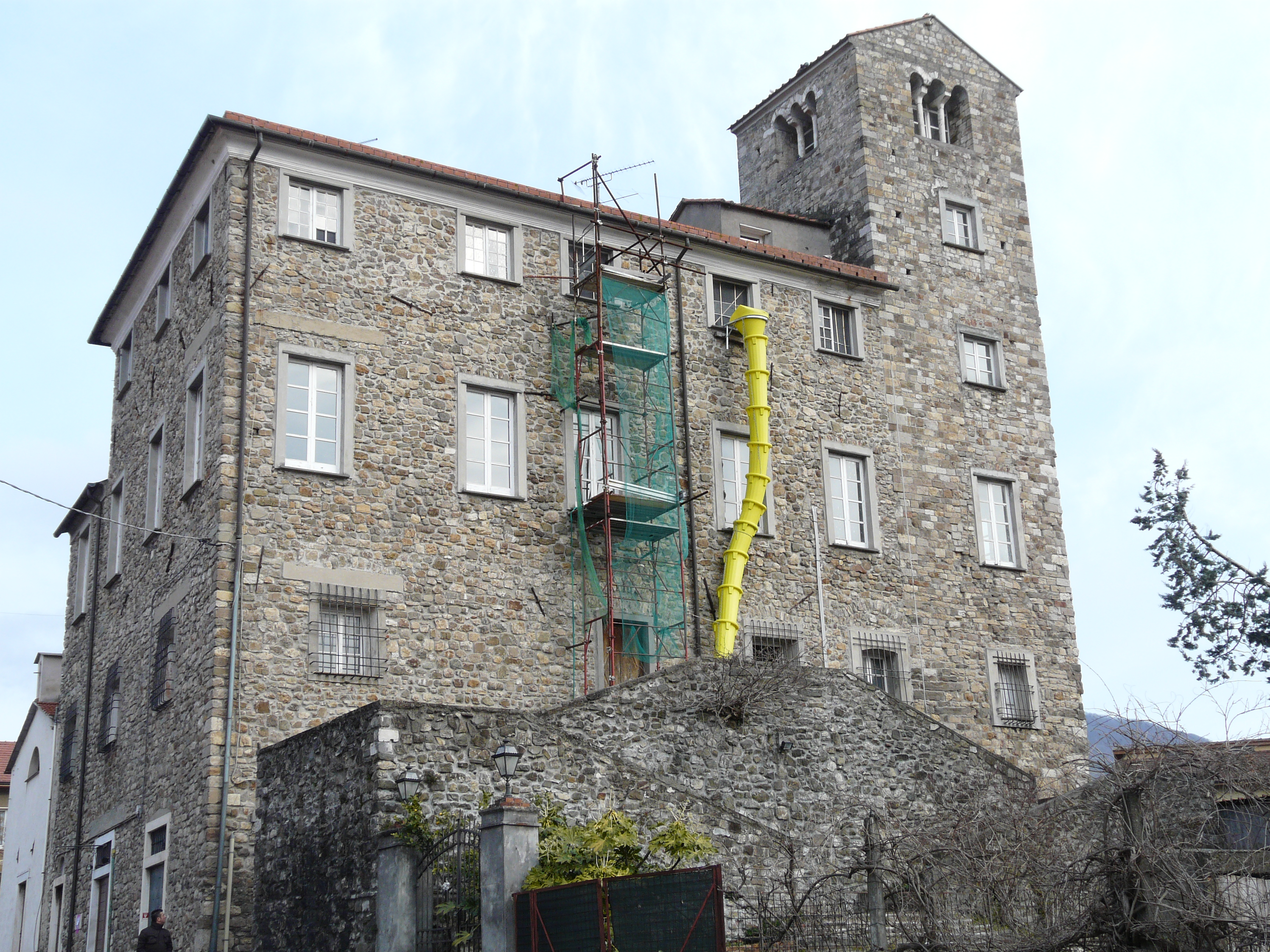 Castello Giustiniani, Ceparana, Bolano, Liguria, Italia